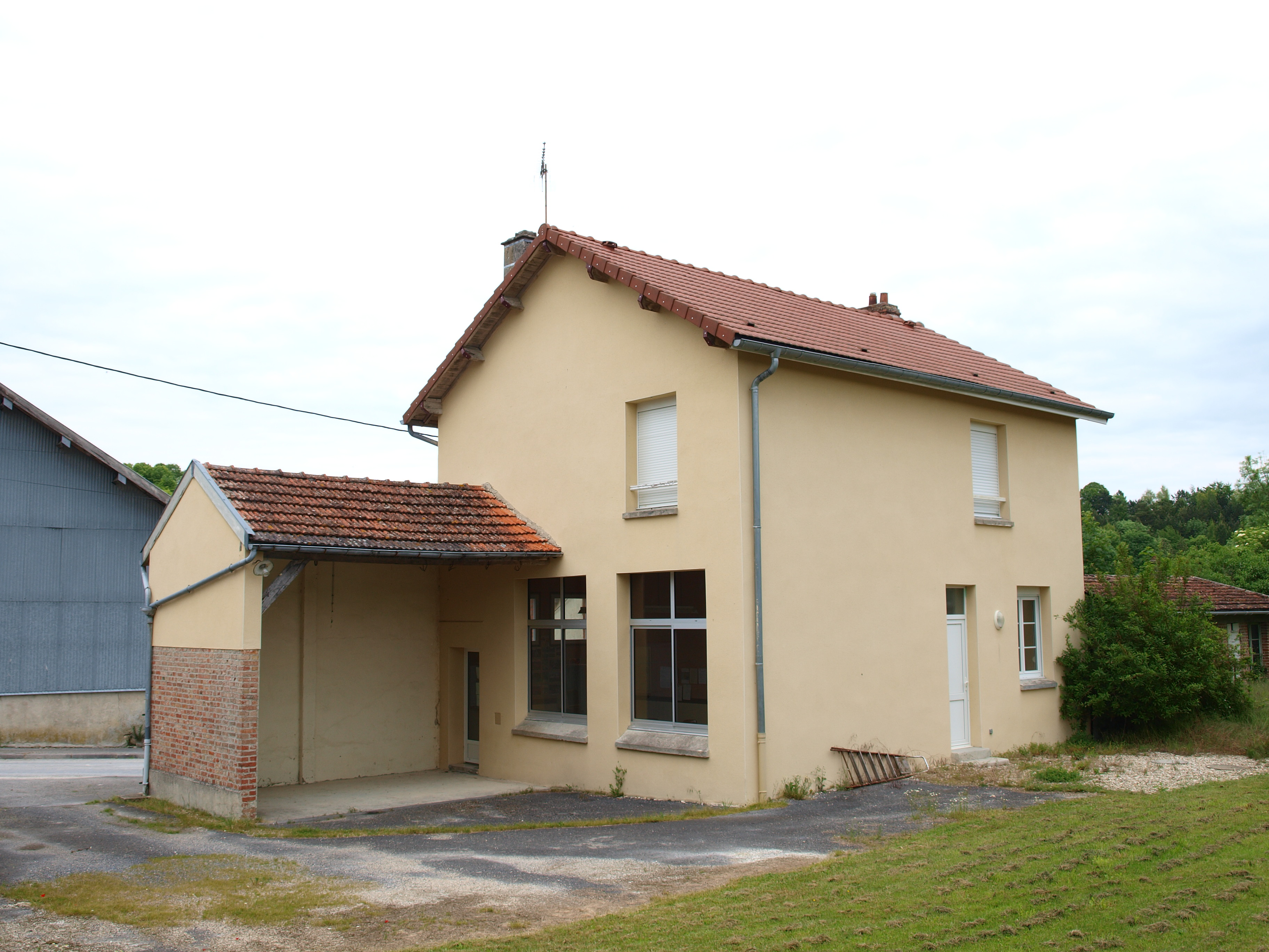 Aure (Ardennes , France) ; mairie